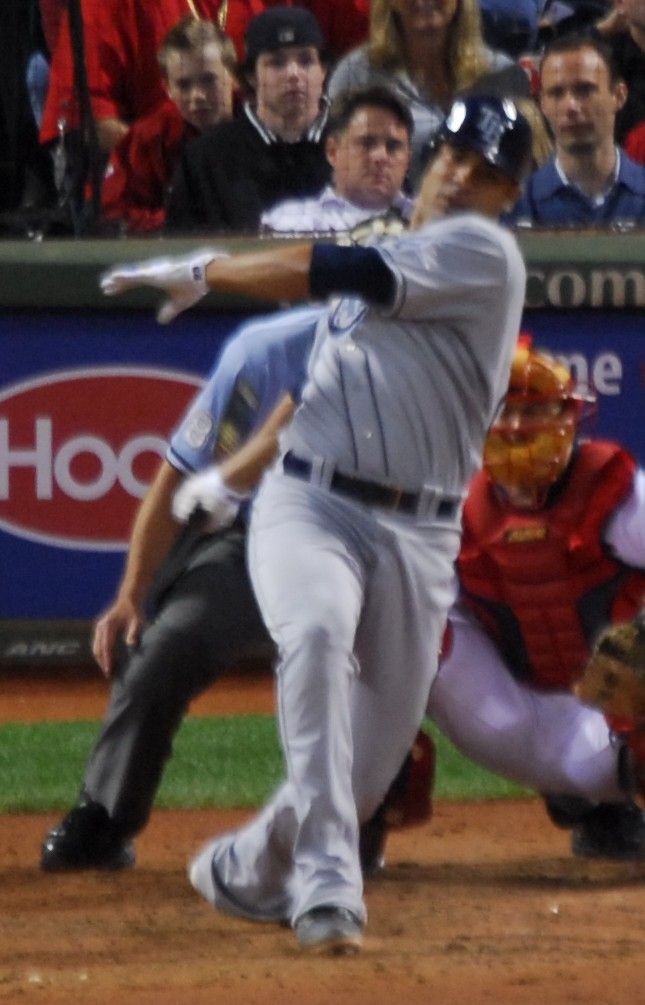 Carlos Peña